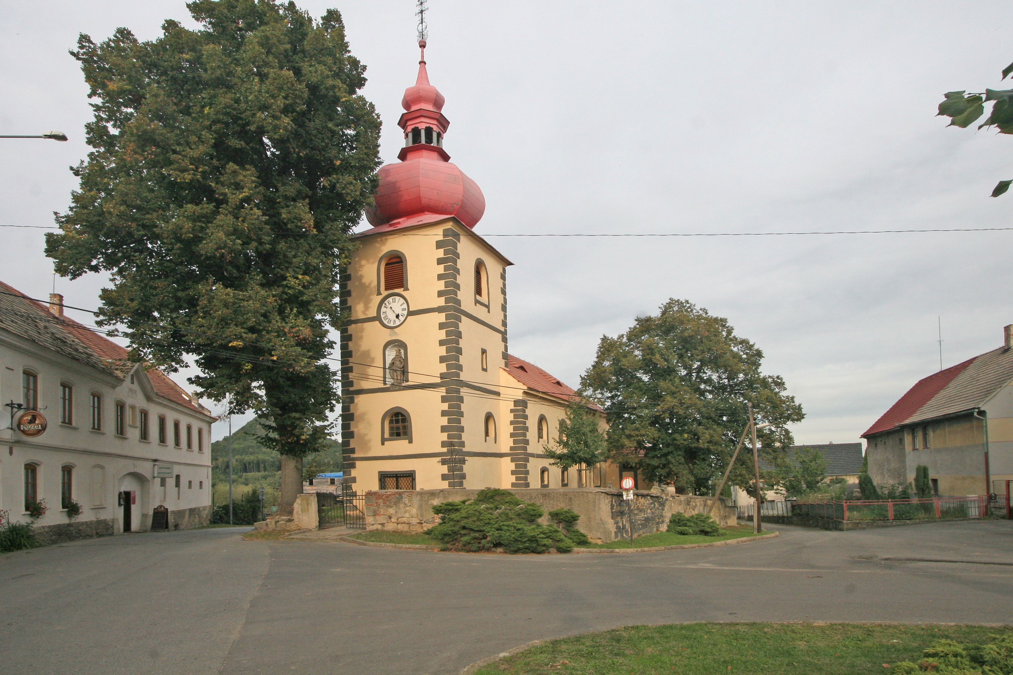 Kostel sv. Václava, Blíževedly